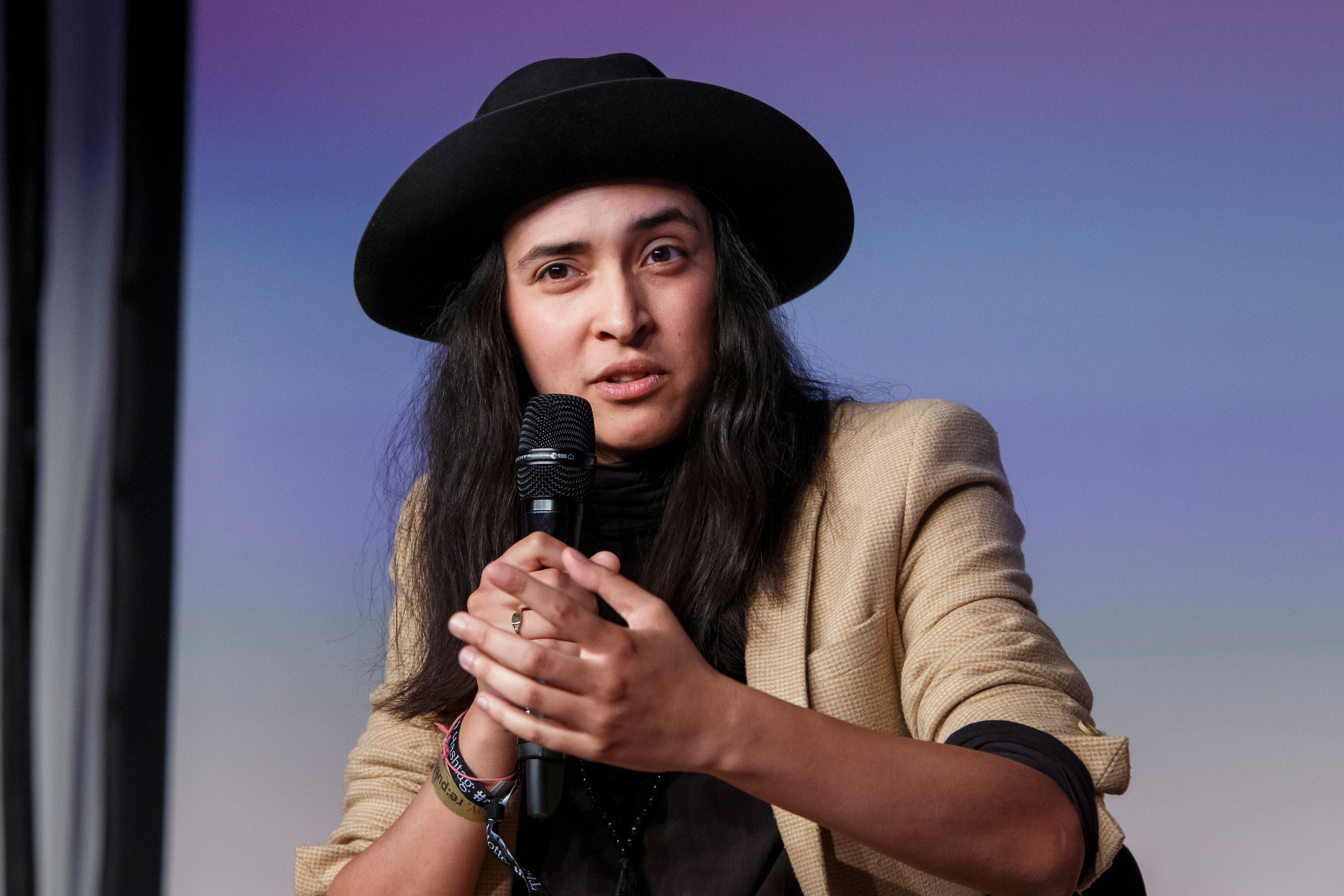 Session: "Machiavelli" live: Der COSMO-Podcast über Rap & Politik Speaker: Diana Kinnert, Nora "sookee" Hantzsch, Vassili Golod, Jan Kawelke